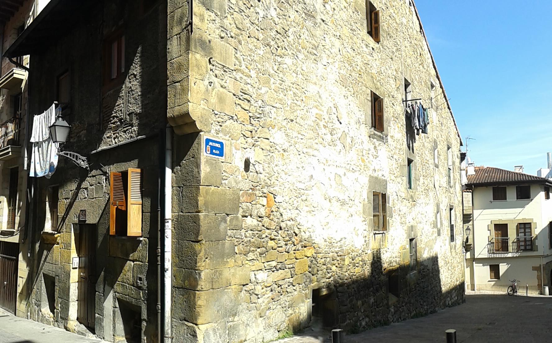 Alde Zaharreko etxea, Amulleta etxearen atzekaldea, Errenterian